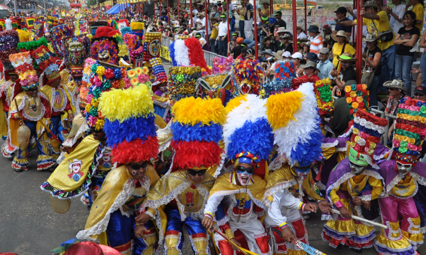 El Carnaval de Barranquilla es la única celebración del Gran Caribe declarada Obra Maestra del Patrimonio Oral e Inmaterial de la Humanidad. Una fiesta enriquecida por las tradiciones, la creatividad y el sabor de los barranquilleros, grandes anfitriones de la alegría en el mundo. This photo has been taken in the country: Colombia